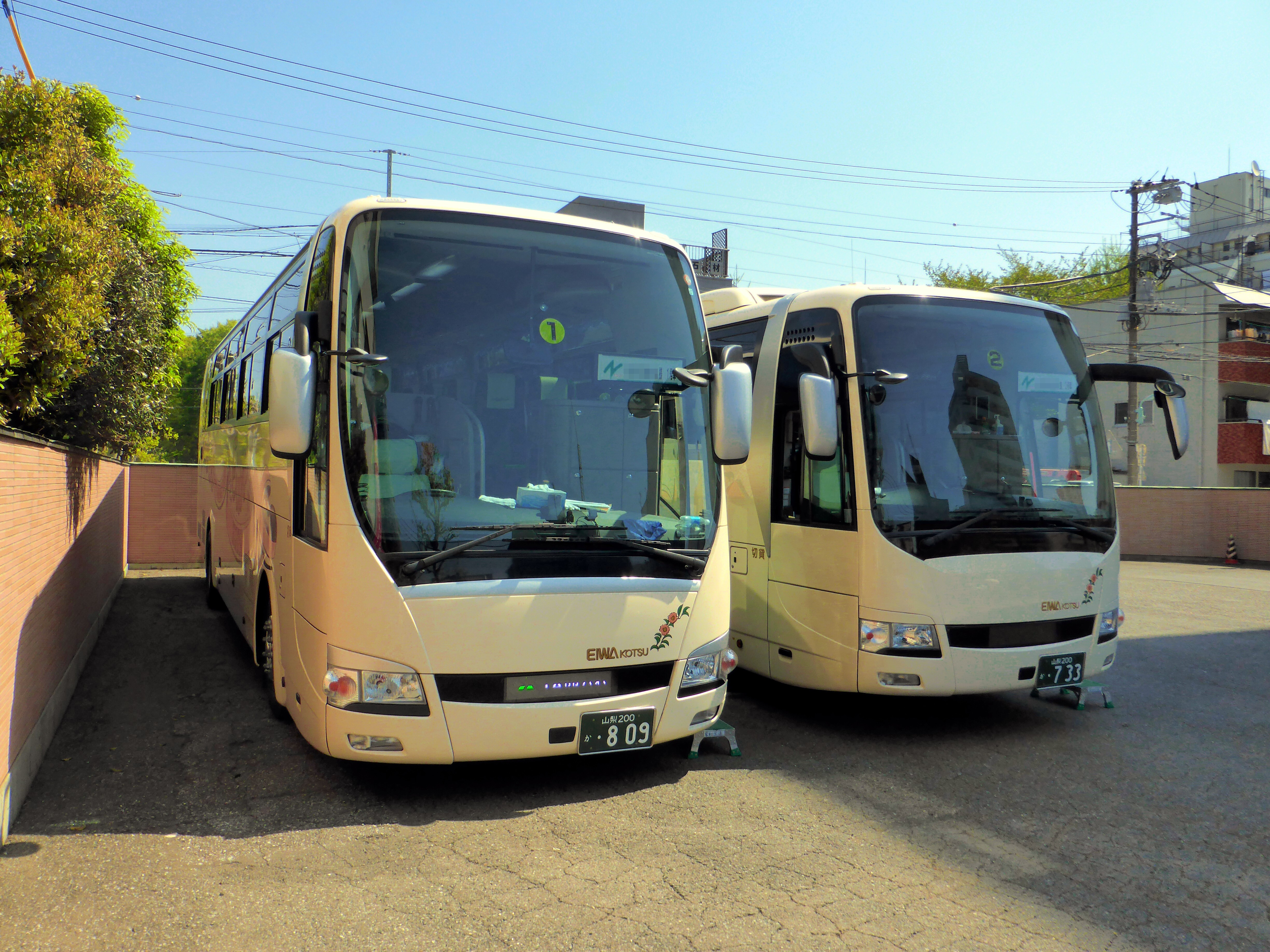 三菱ふそう・エアロクィーン/エアロエース（共にQTG-MS96VP）フロントの比較左：エアロクィーン（栄和交通 山梨200か809）右：エアロエース（栄和交通 山梨200か733）